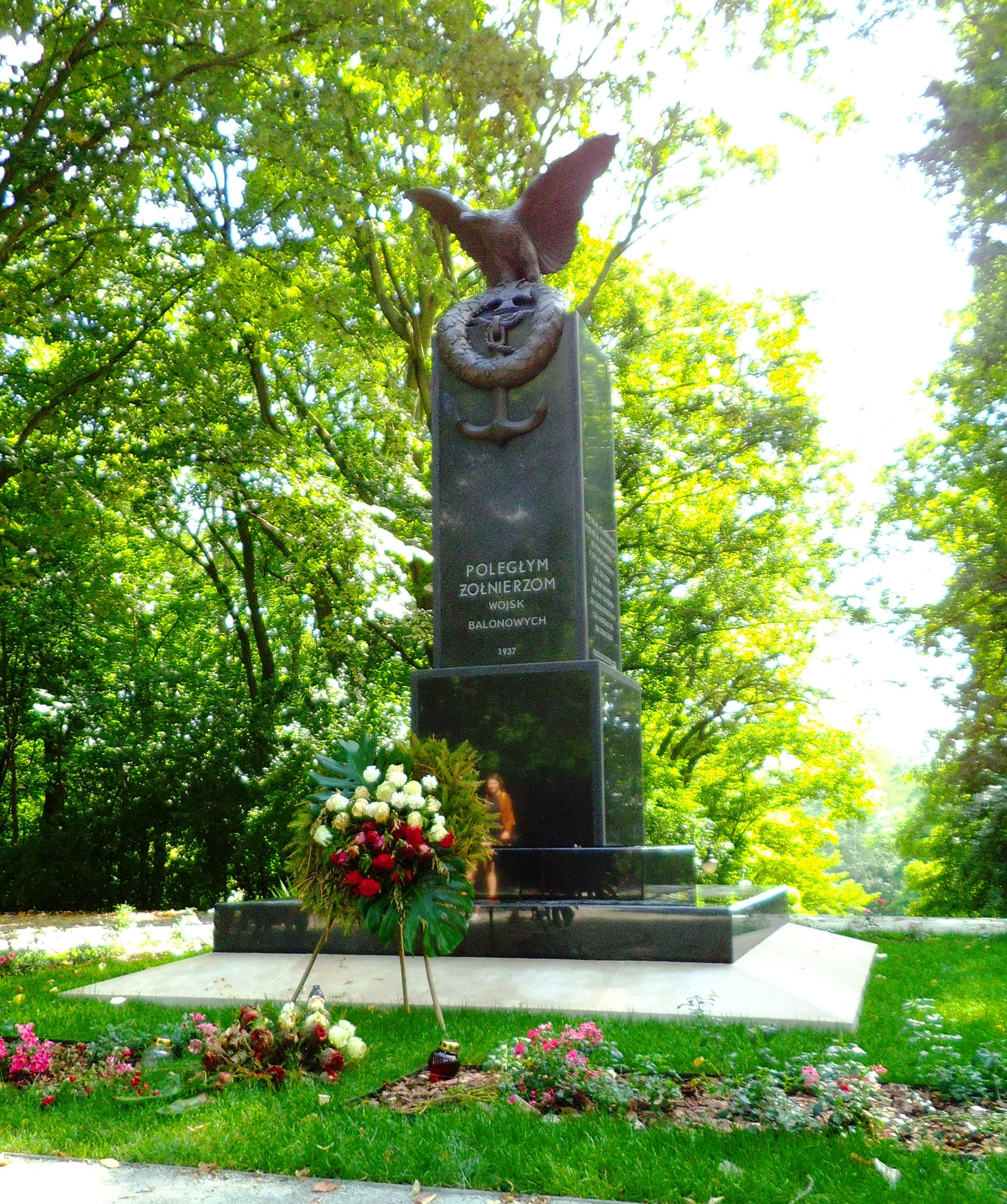 Pomnik Żołnierzy Wojsk Balonowych w Toruniu